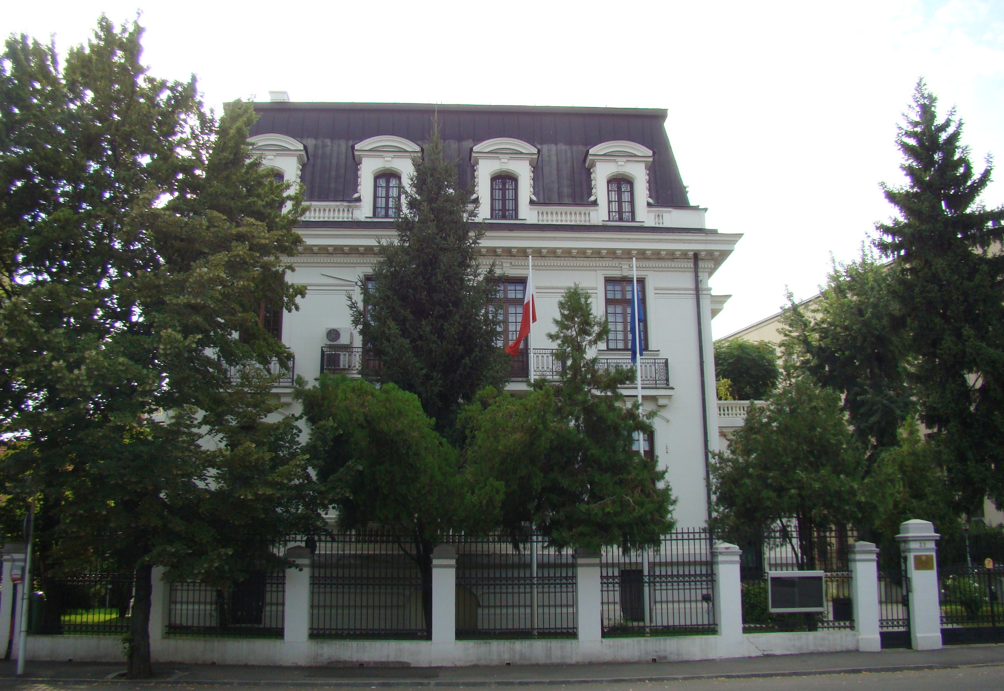 Casă monument istoric, str. Aleea Alexandru, nr. 23 (în prezent Ambasada Poloniei la București)